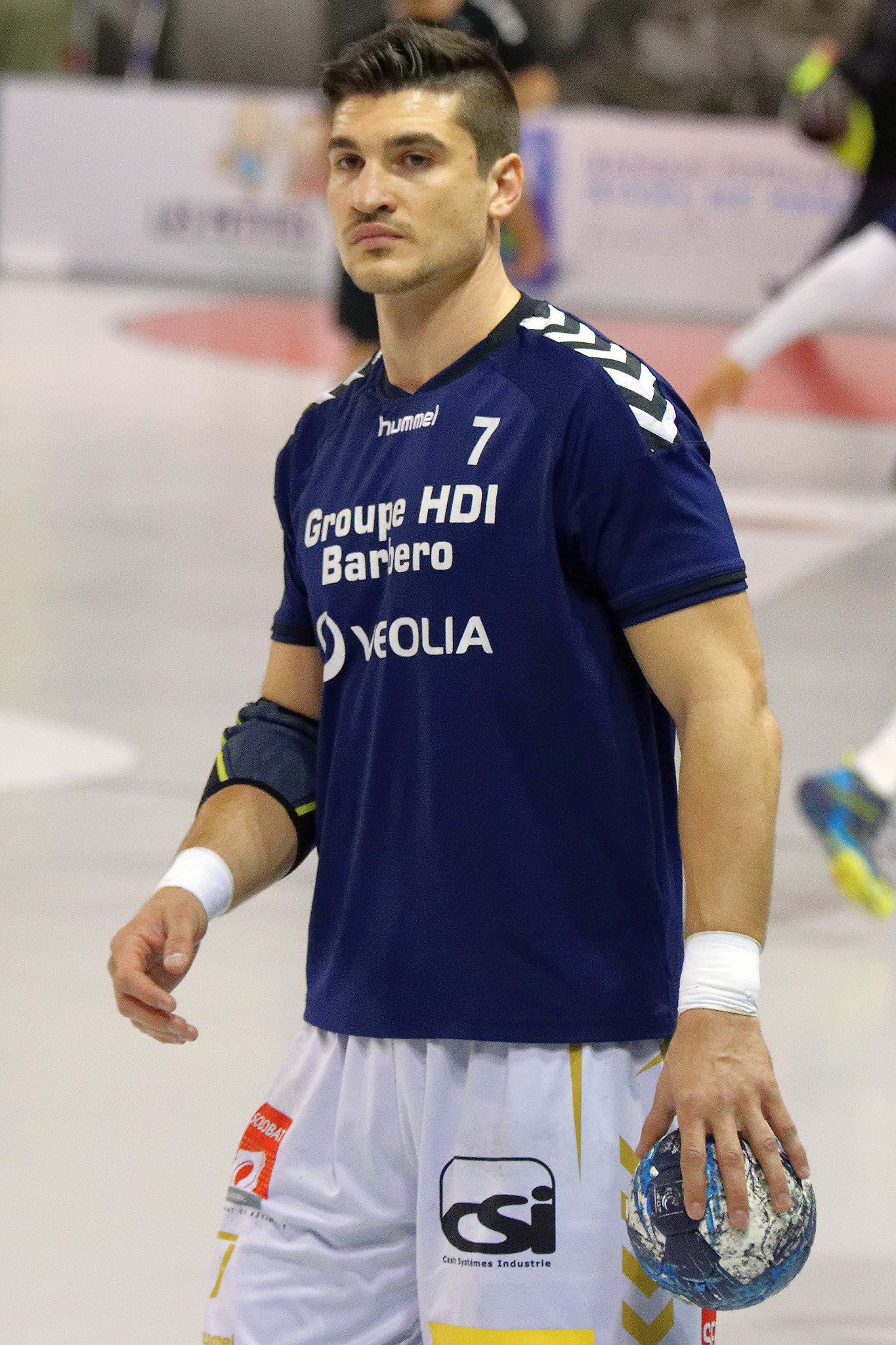 Ivry - Saint-Raphaël lors de la 19e journée du championnat de France de handball masculin le 23 mars 2016 au gymnase Auguste Delaune à Ivry sur Seine.